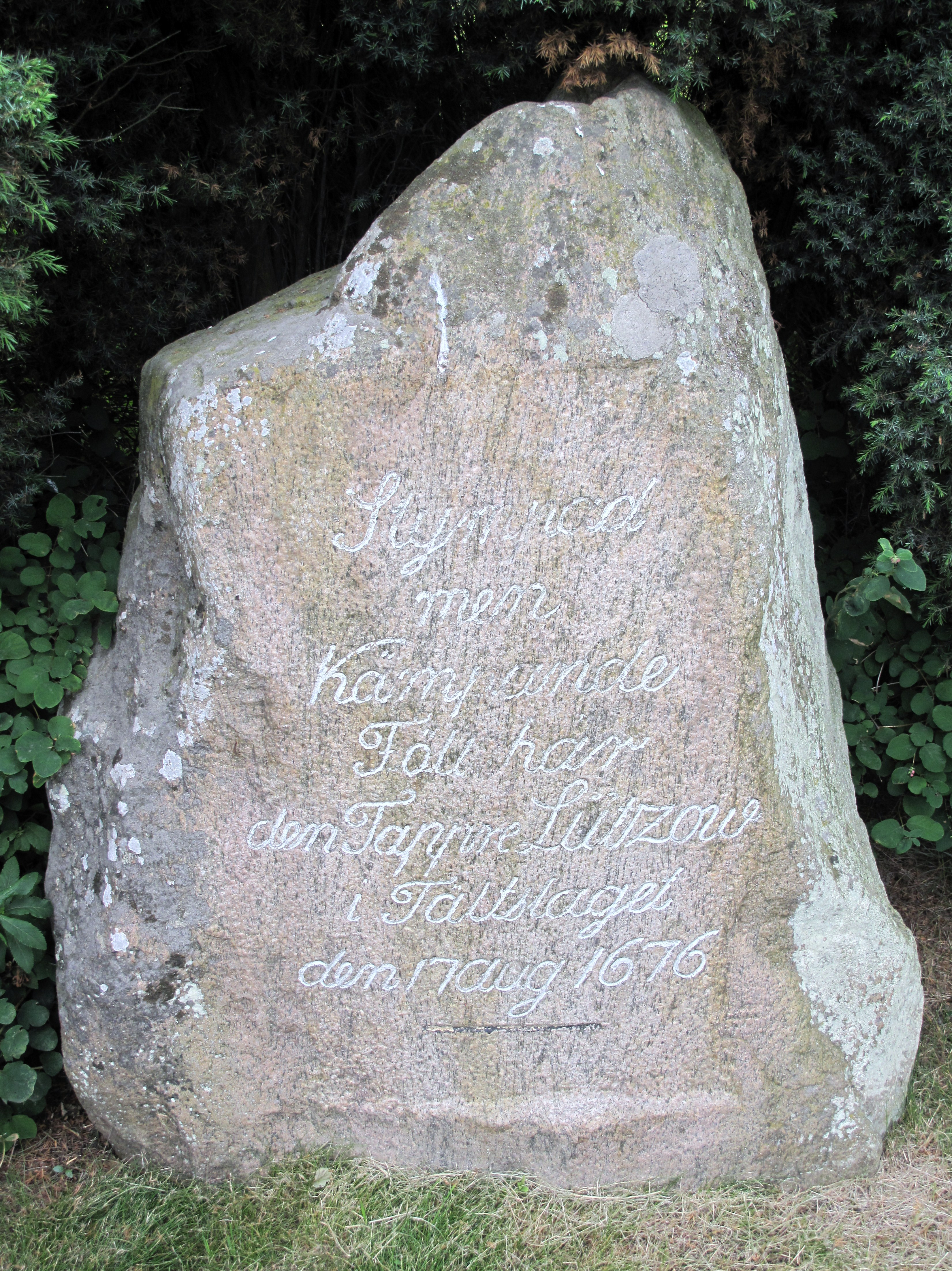 Lützowstenen (RAÄ-nummer Snöstorp 28:1) i Fyllinge, Snöstorps socken, Tönnersjö härad, Halmstads kommun, Hallands län, Halland, Sverige. Inskriptionen lyder: "Stympad men kämpande föll här den tappre Lützow i fältslaget den 17 aug 1676."